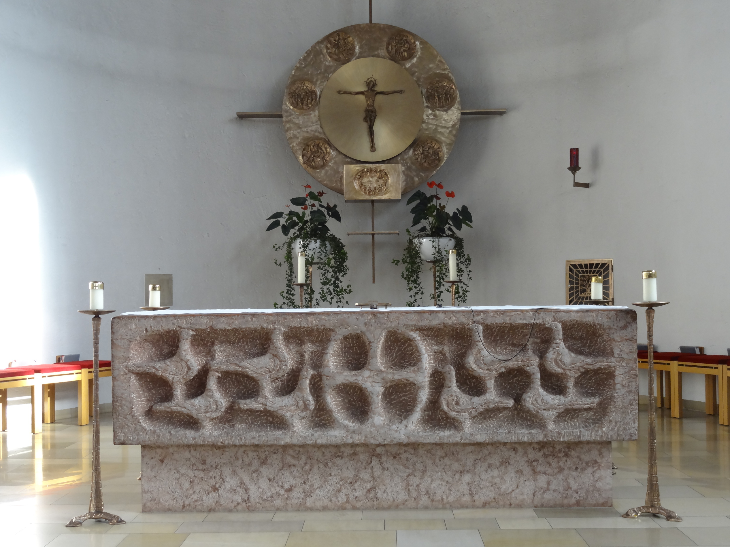 Zelebrationsaltar der Pfarrkirche St. Josef in Niederaichbach (Lkr. Landshut, Bayern)